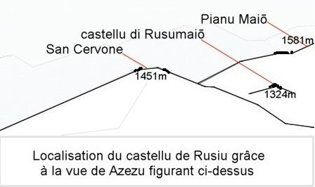 Localisation du site préhistorique Rusumaiò, Rusiu, Corsica. Schéma pour situer le site (Cima à u Castellu 1324 m). Réalisé en référence à la photo affichée sur la même page Vallerustie), et déposée par Azezu.